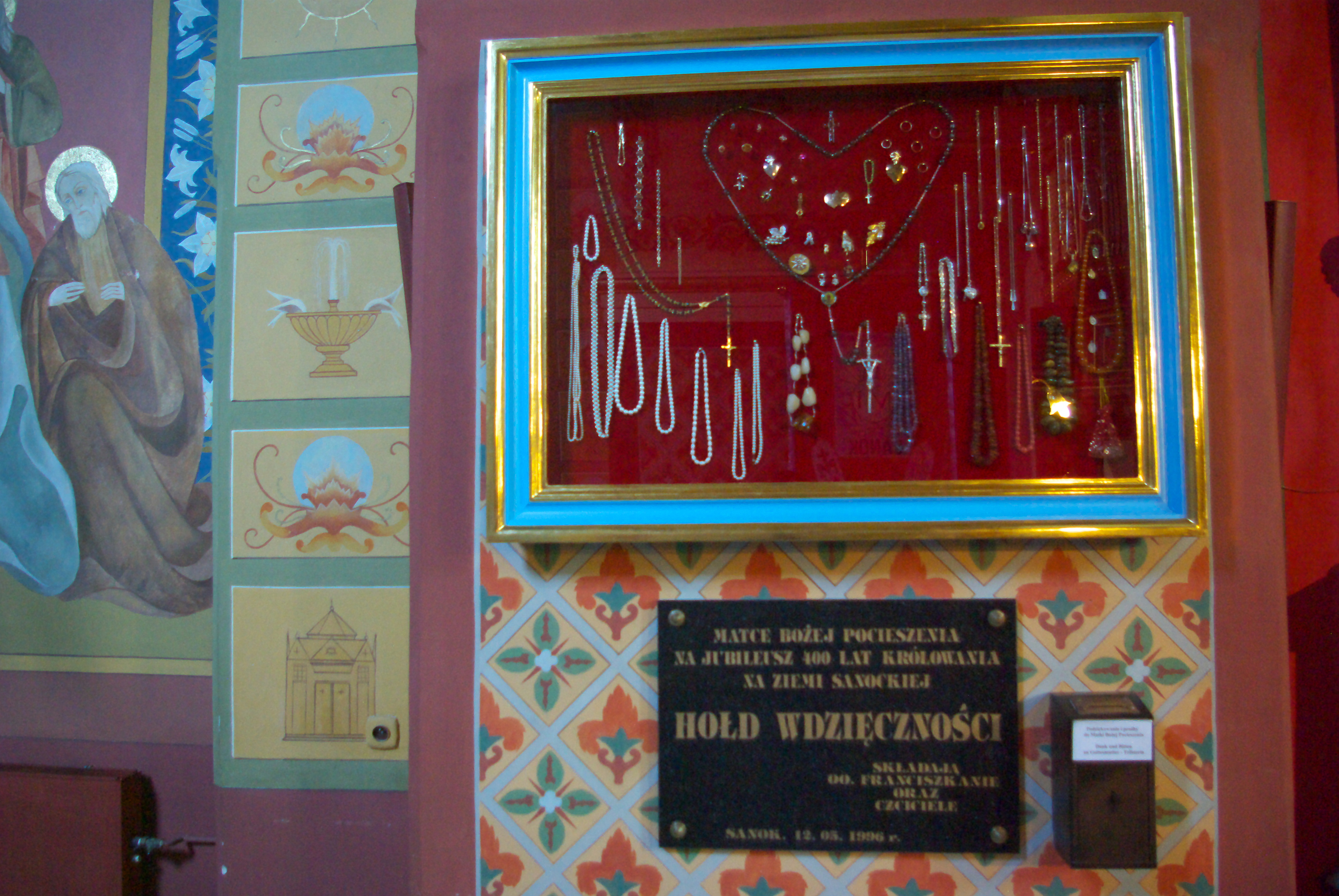 Lewa nawa im św. Maksymiliana Kolbe w kościele franciszkanów w Sanoku. Wota i tablica pamiątkowa